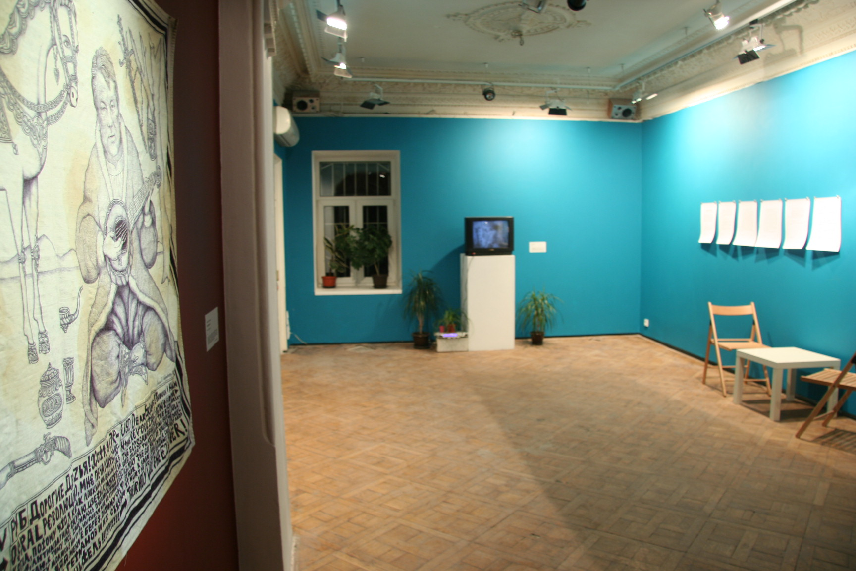 РЕП "Нова українська мова", 2008